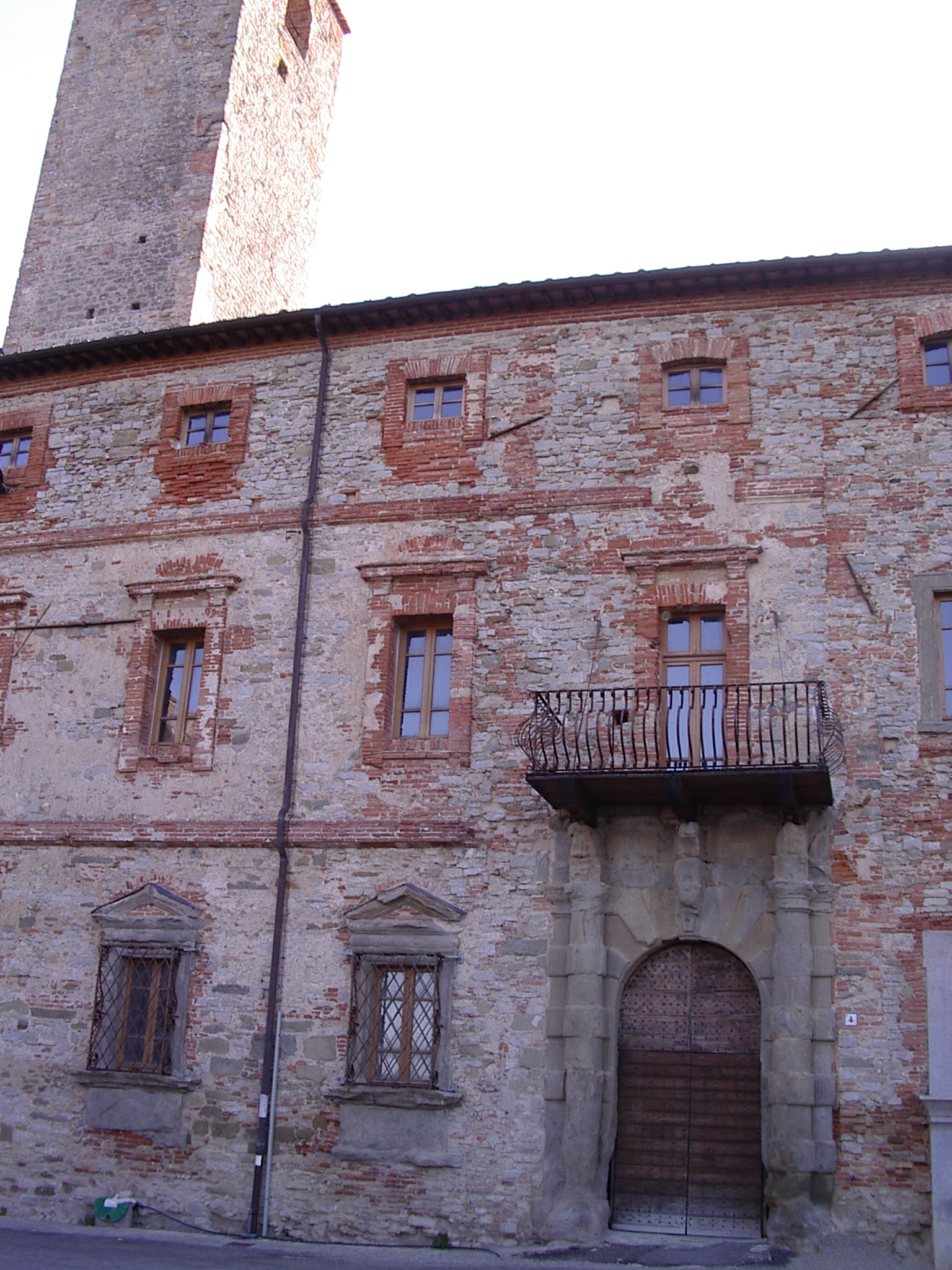 Palazzo Bourbon del Monte Santa Maria Tiberina , Ombrie, Italie